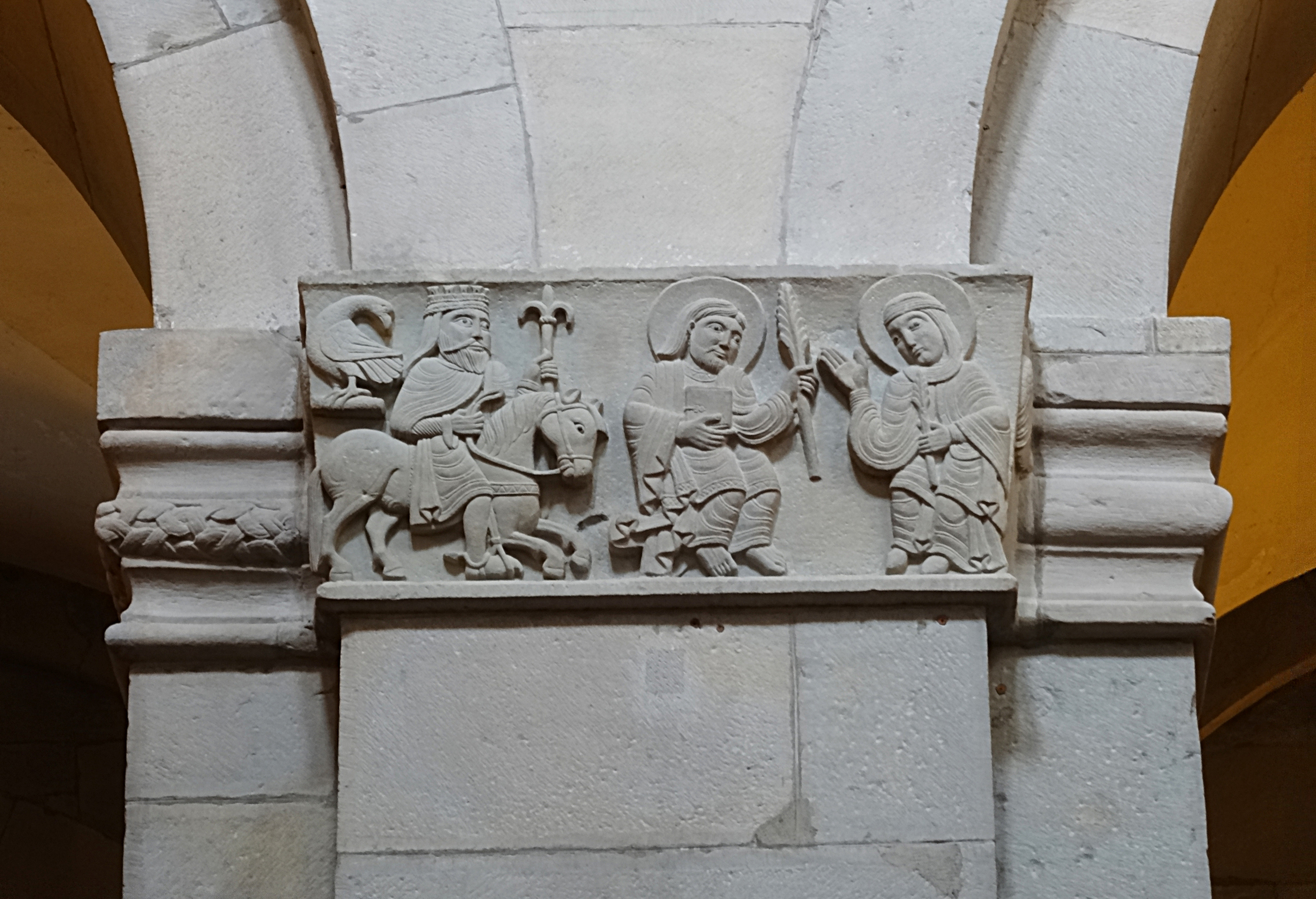 Pfeilerkapitell Felix und Regula (Gründungslegende) im Grossmünster Zürich